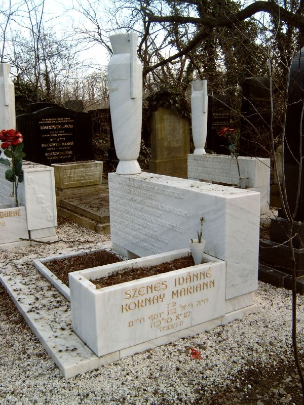 KORNAY MARIANNE, Szenes Ivánné (1930. január 14.- 2004. május 24.) színész, konferanszié sírja Budapesten. Kozma utcai izraelita temető: 15-1-48.